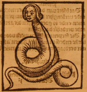 Antica incisione nello "Speculum naturale" di Vincenzo di Beauvais raffigurante un dracontopode.